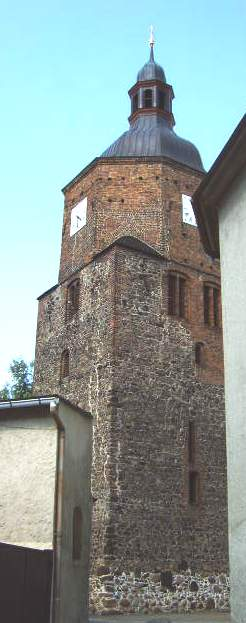 Wendisch-Deutsche Doppelkirche in Vetschau, Land Brandenburg, Deutschland Turm Bild aufgenommen am 26.6.2006 von Olaf Meister